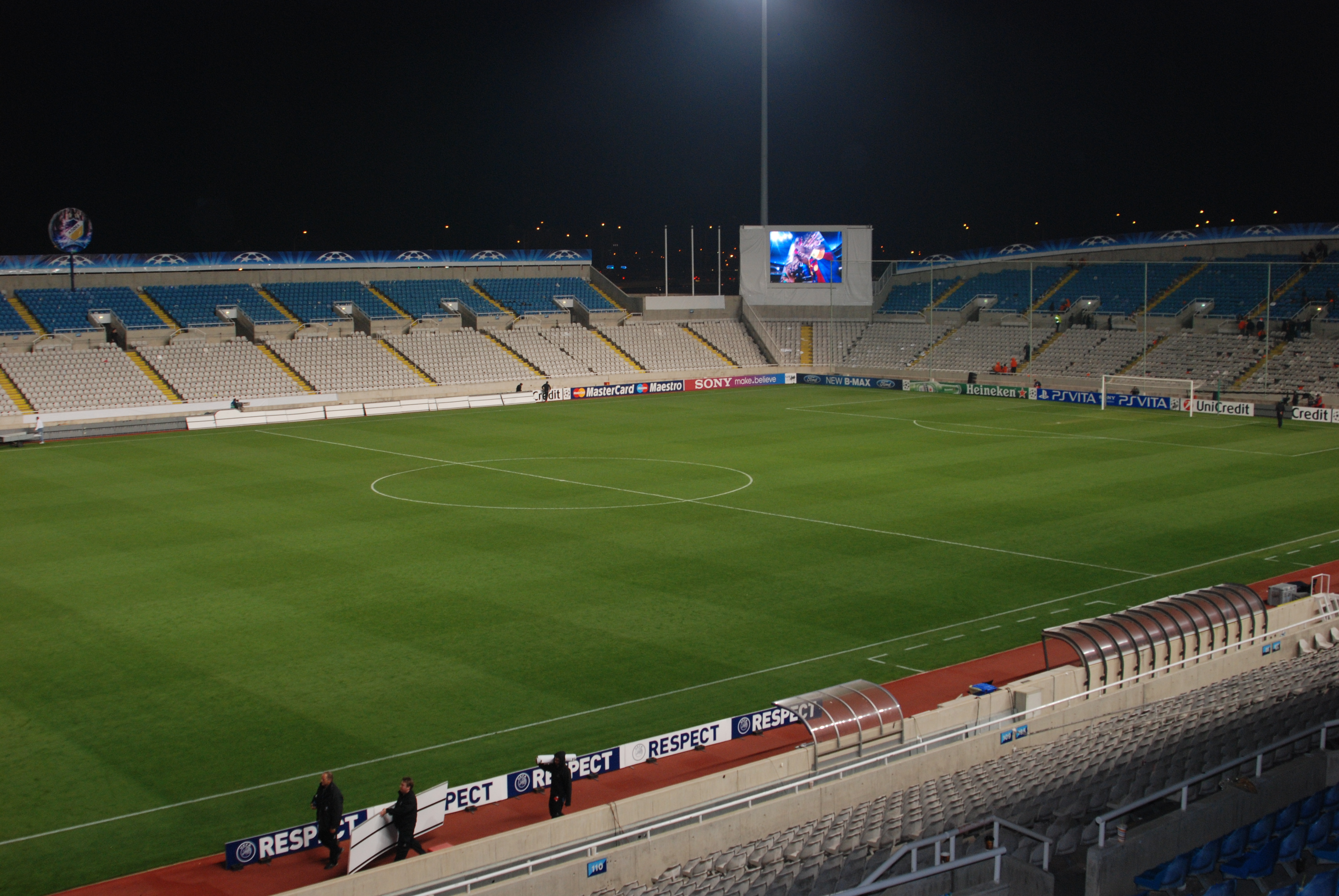 APOEL - real madrid